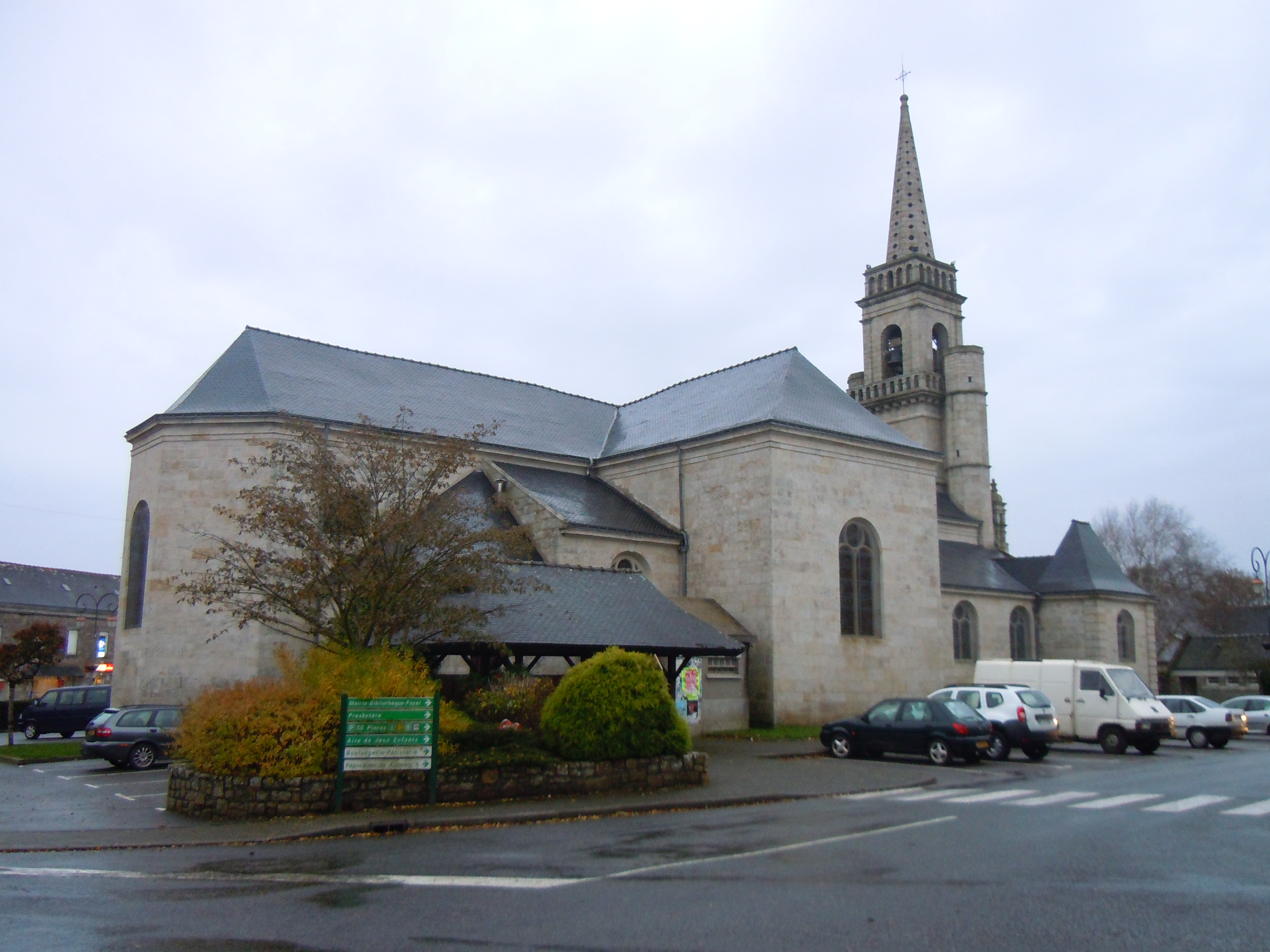 l'église paroissiale de Querrien (département du Finistère)